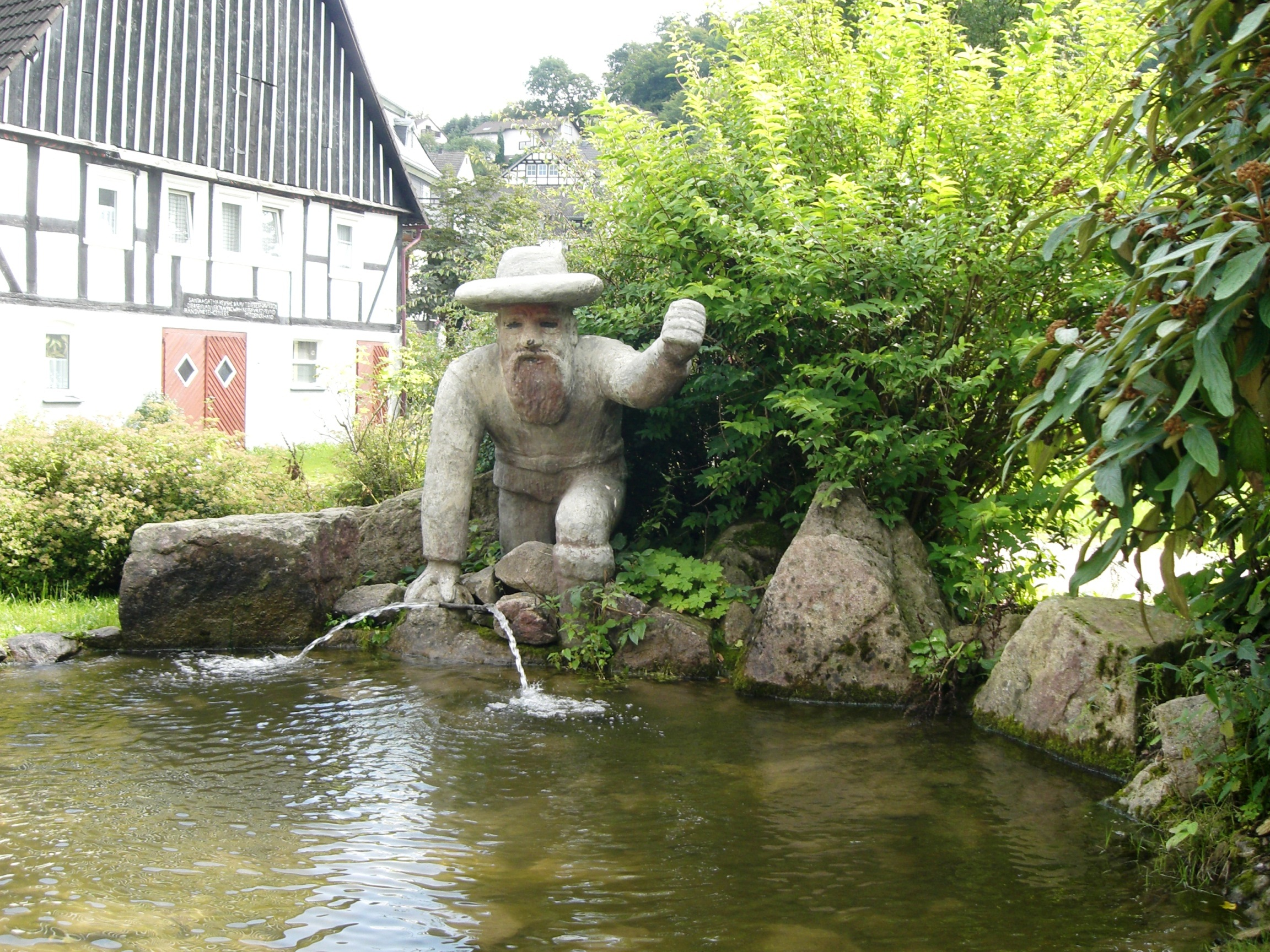 Der Lintloe-Brunnen am historischen Wanderweg in Oedingen erinnert an die Sage vom Obristen Jan von Lintloe